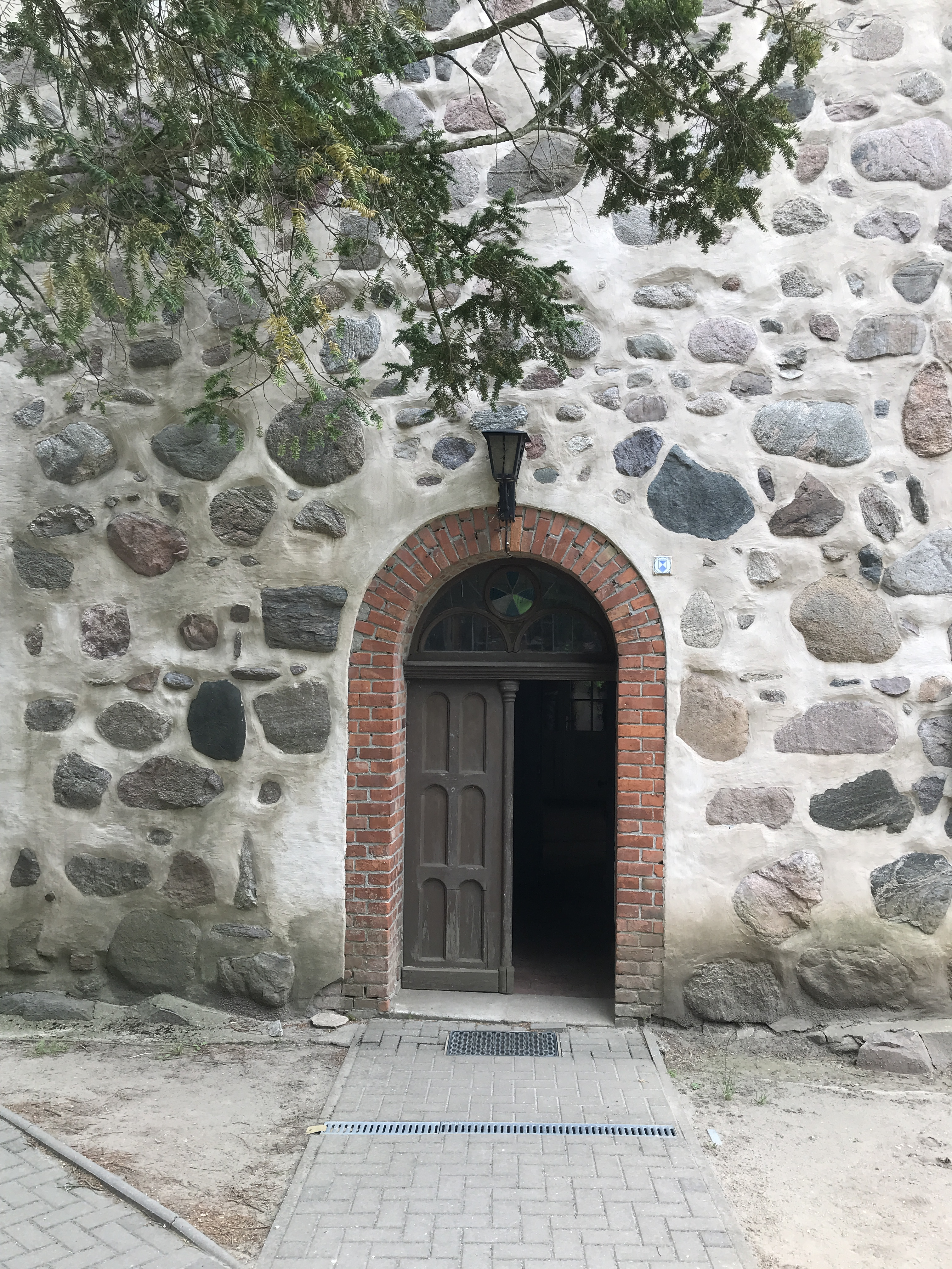 Die Dorfkirche Göttin im gleichnamigen Ortsteil der Stadt Brandenburg an der Havel im Land Brandenburg ist eine Saalkirche aus dem Jahr 1870. Im Innern steht unter anderem ein Altarretabel mit einem Gemälde der Grablegung Christi.